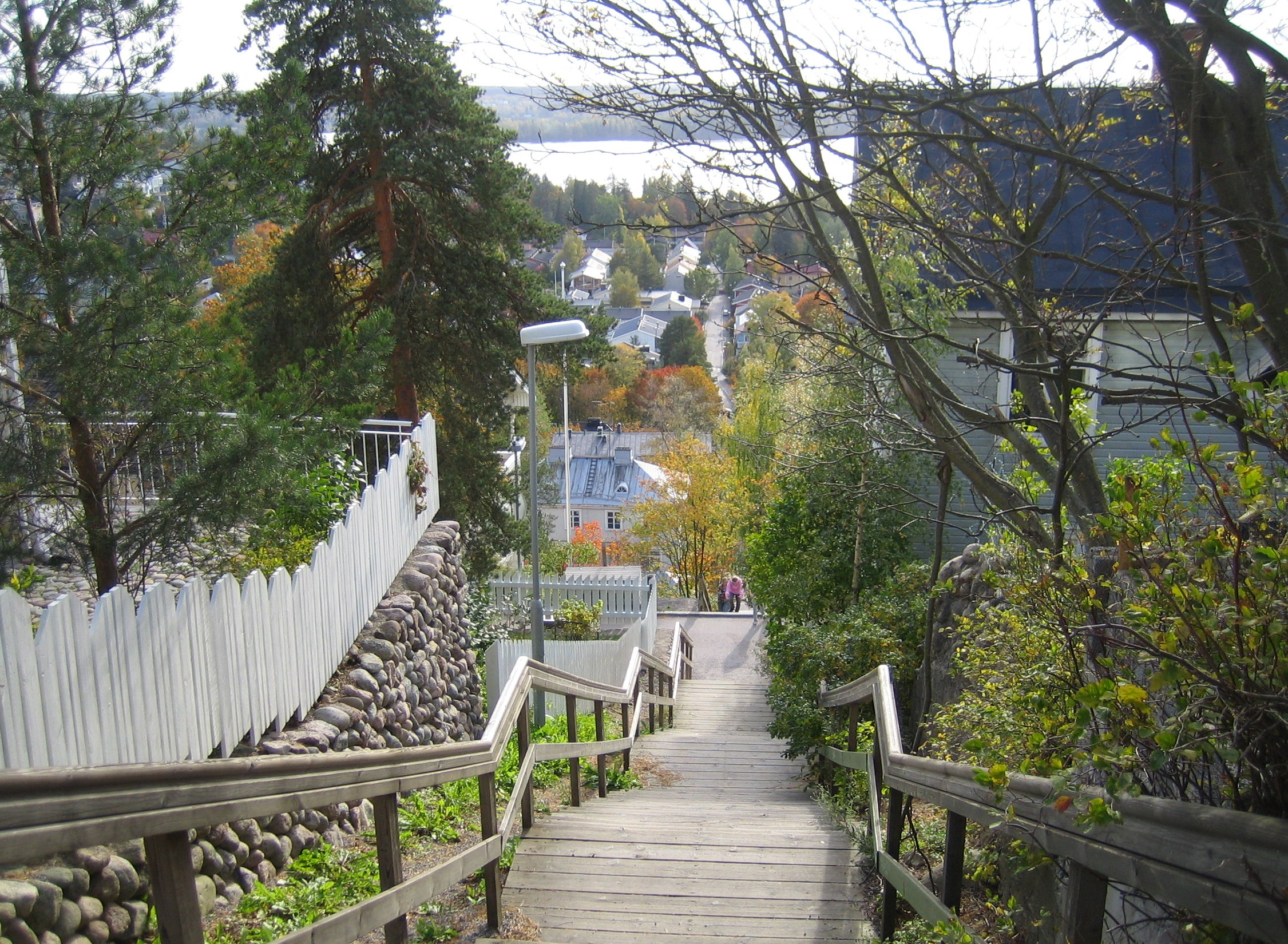 Pispala, Tampere, Finland